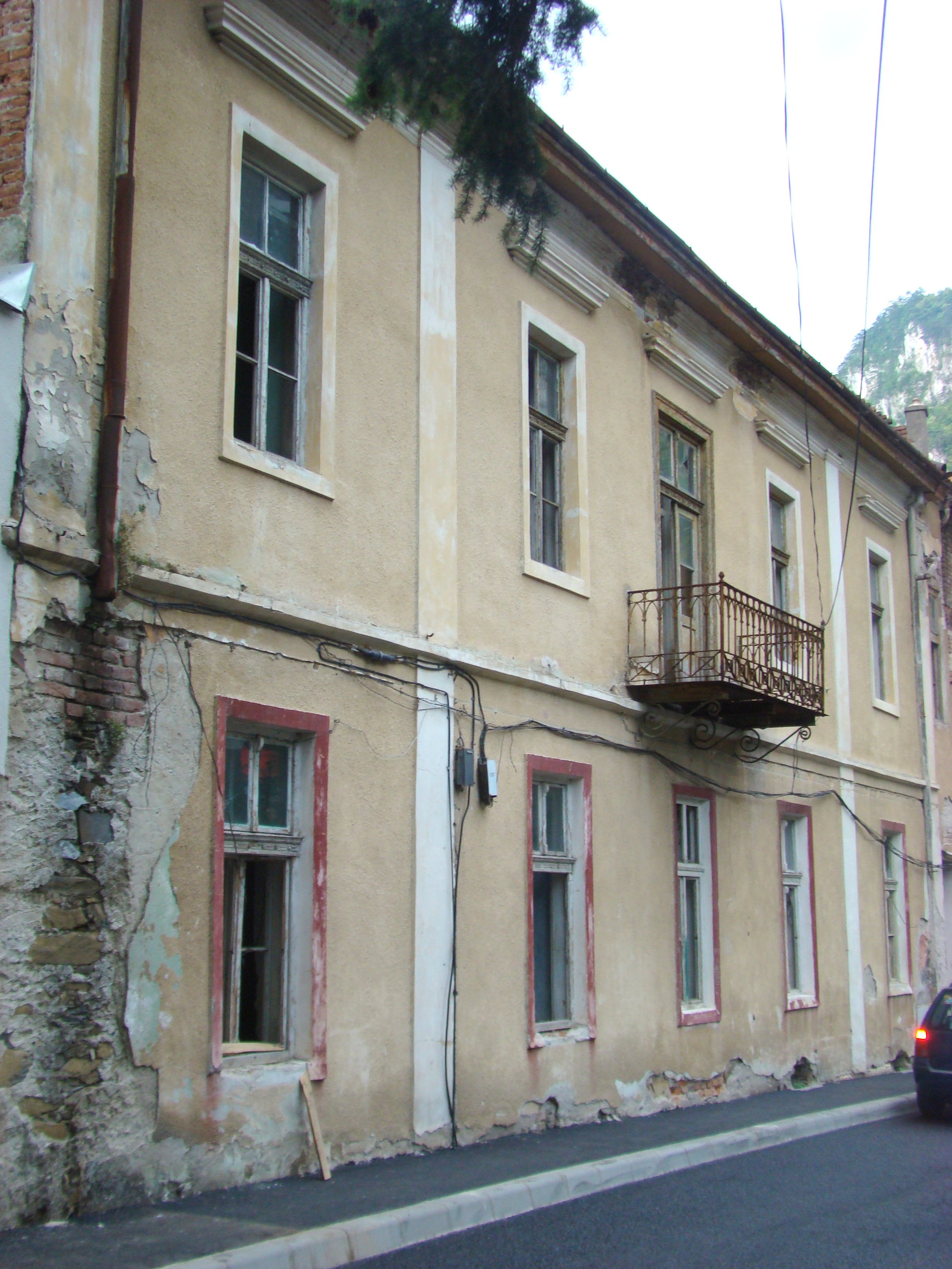 Vila „Transilvania” ("Tolvay"), oraș Băile Herculane, Str. Stoica de Hațeg Nicolae 4